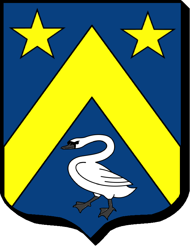 D'azur, au chevron d'or, accompagné de 2 étoiles de même en chef, et d'un cygne d'argent, membré et becqué de sable, en pointe.